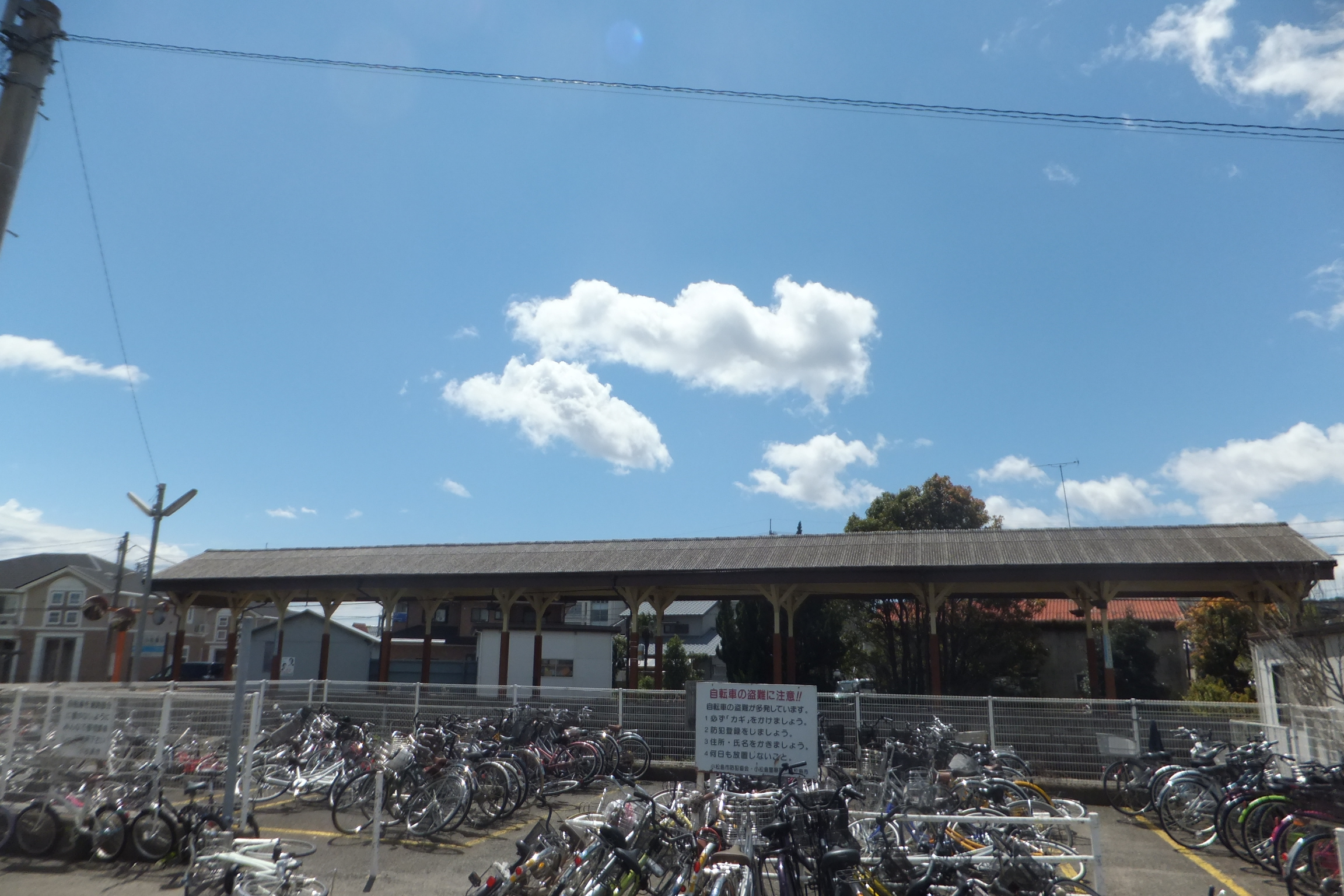 南小松島駅（2014年4月9日）